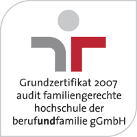 Grundzertifikat 2007 - audit familiengerechte hochschule der berufundfamilie gGmbH